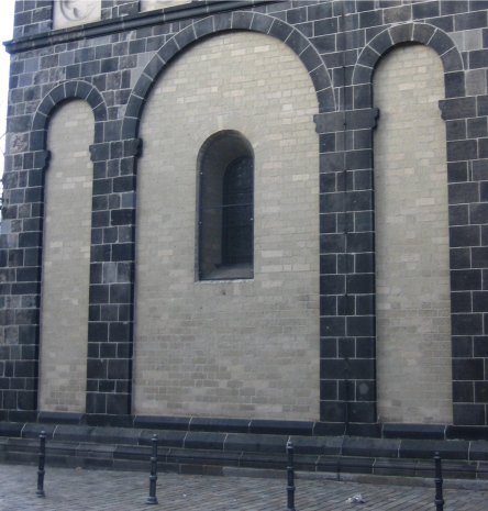 Blendarkaden an einer Kirche